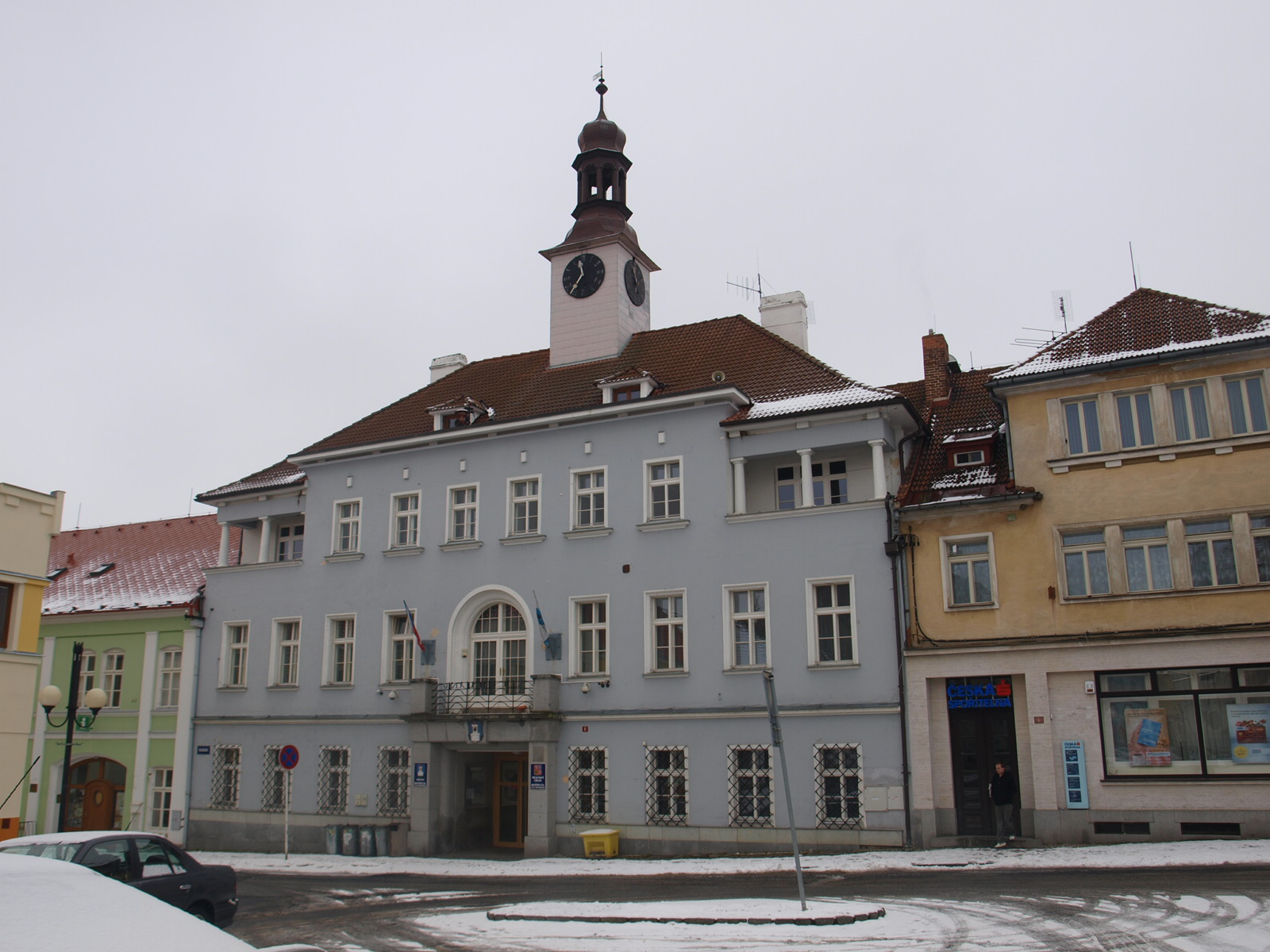 budova radnice na náměstí